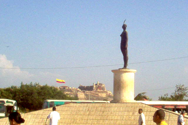 India Catalina; Avenida Pedro de Heredia; Cartagena de Indias, Colombia.